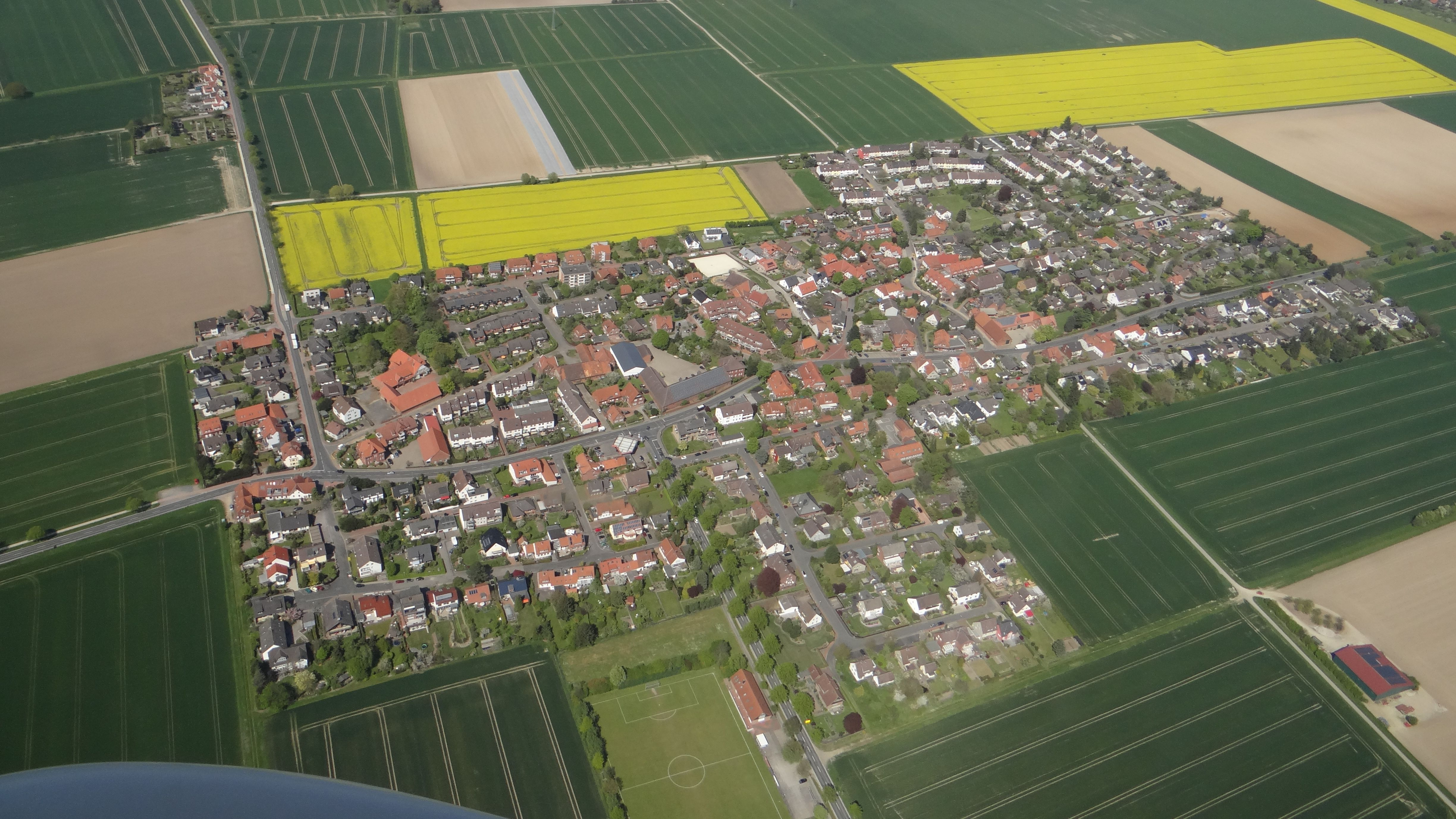 Harenberg Luftbild 5671a